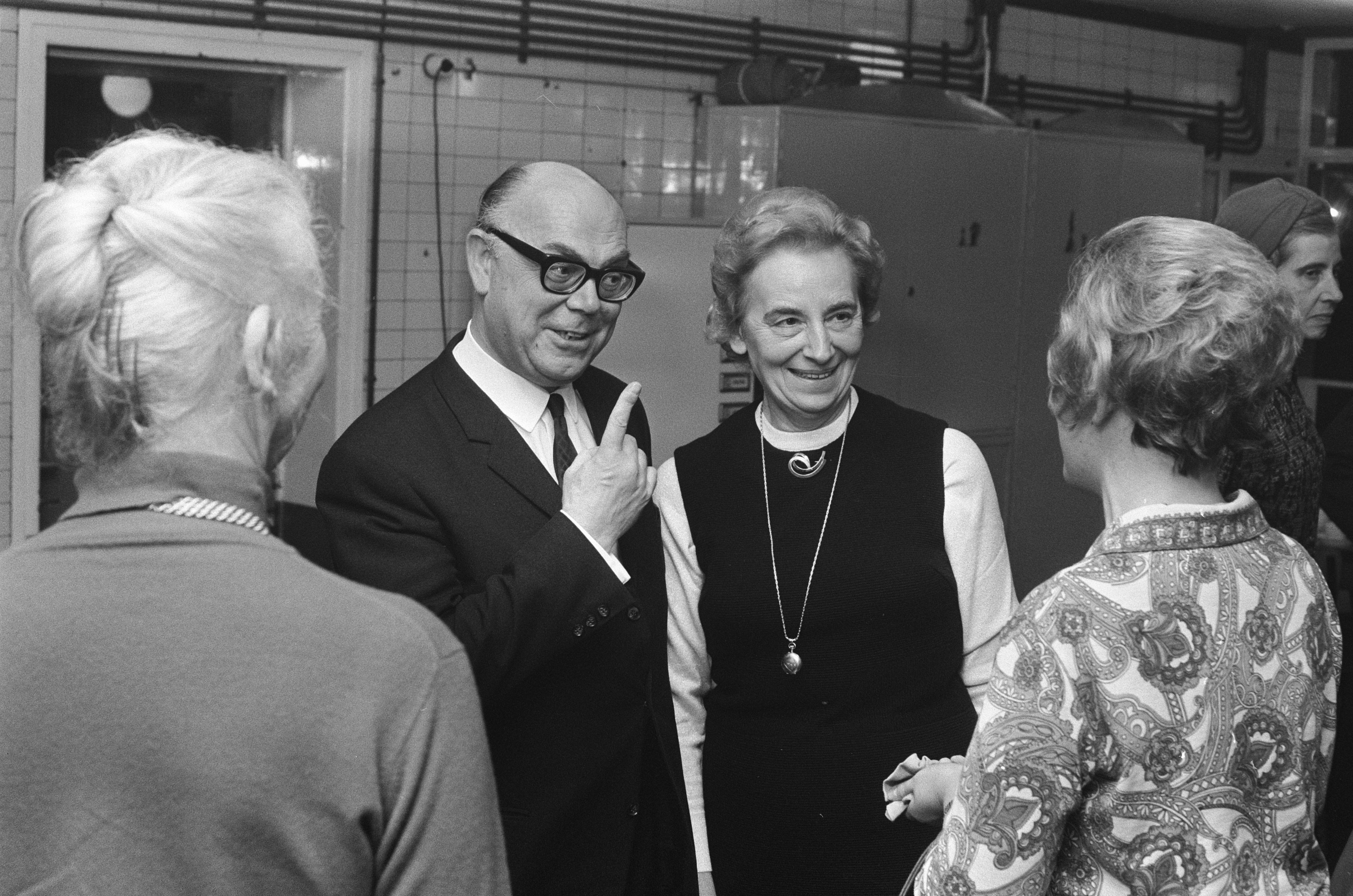 Pierre Dubois ontvangt de Henriette Roland Holstprijs voor zijn werk over Marcellus Emants te Amsterdam. Pierre Dubois met echtgenote Datum 21 november 1969